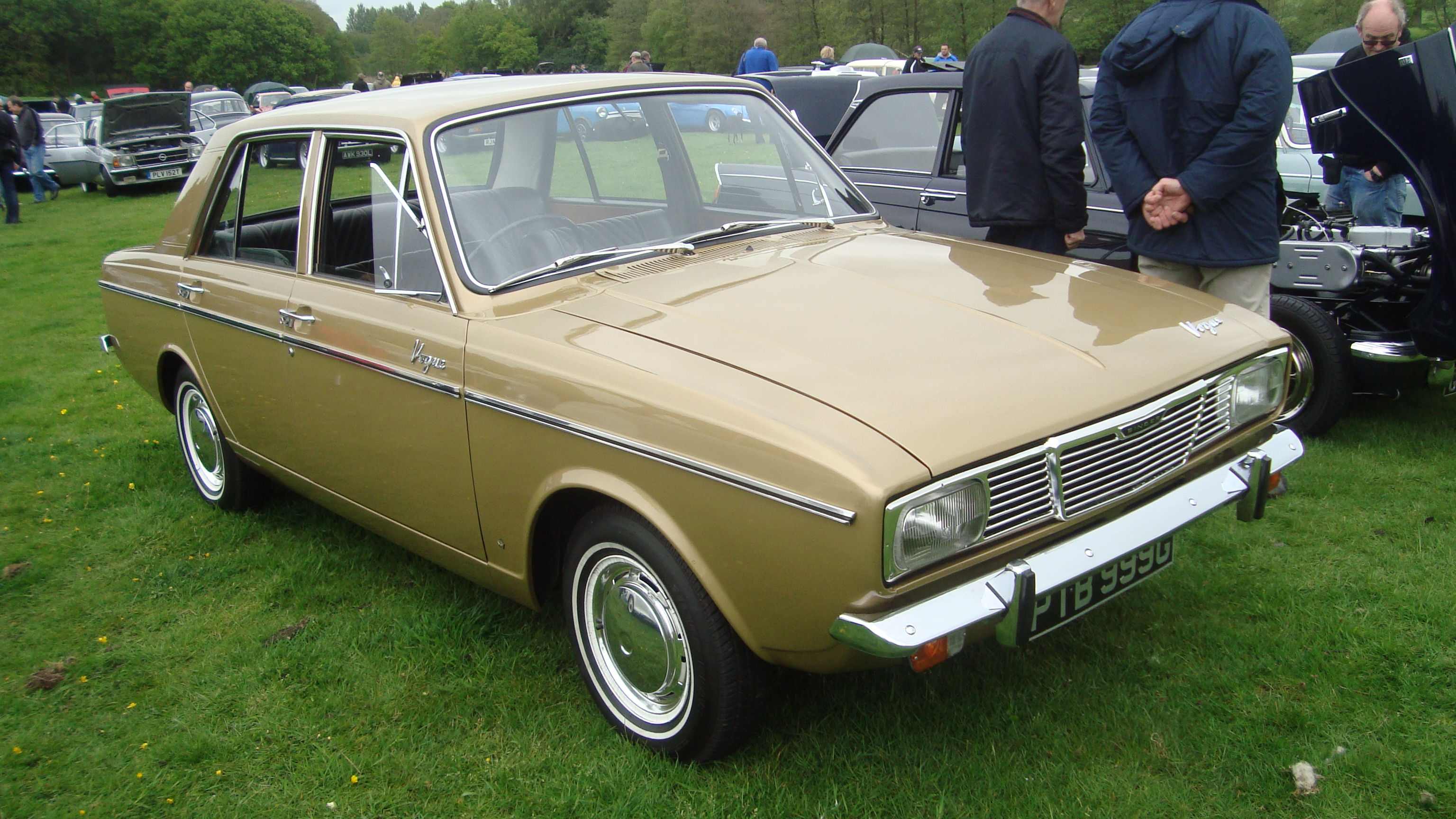 1969 Singer Vogue 1725 CC